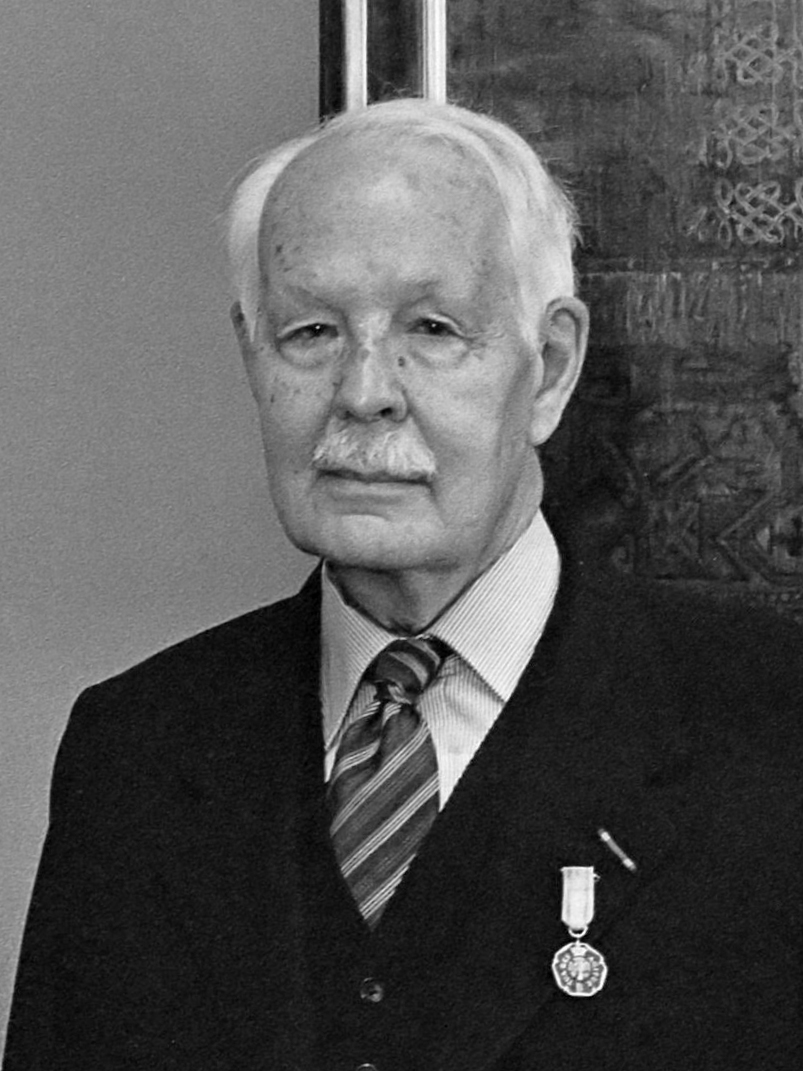 Uitreiking Zilveren Anjers ; v.l.n.r. A. Bokma , Prins Bernhard en M. Niemeijer 22 juni 1982